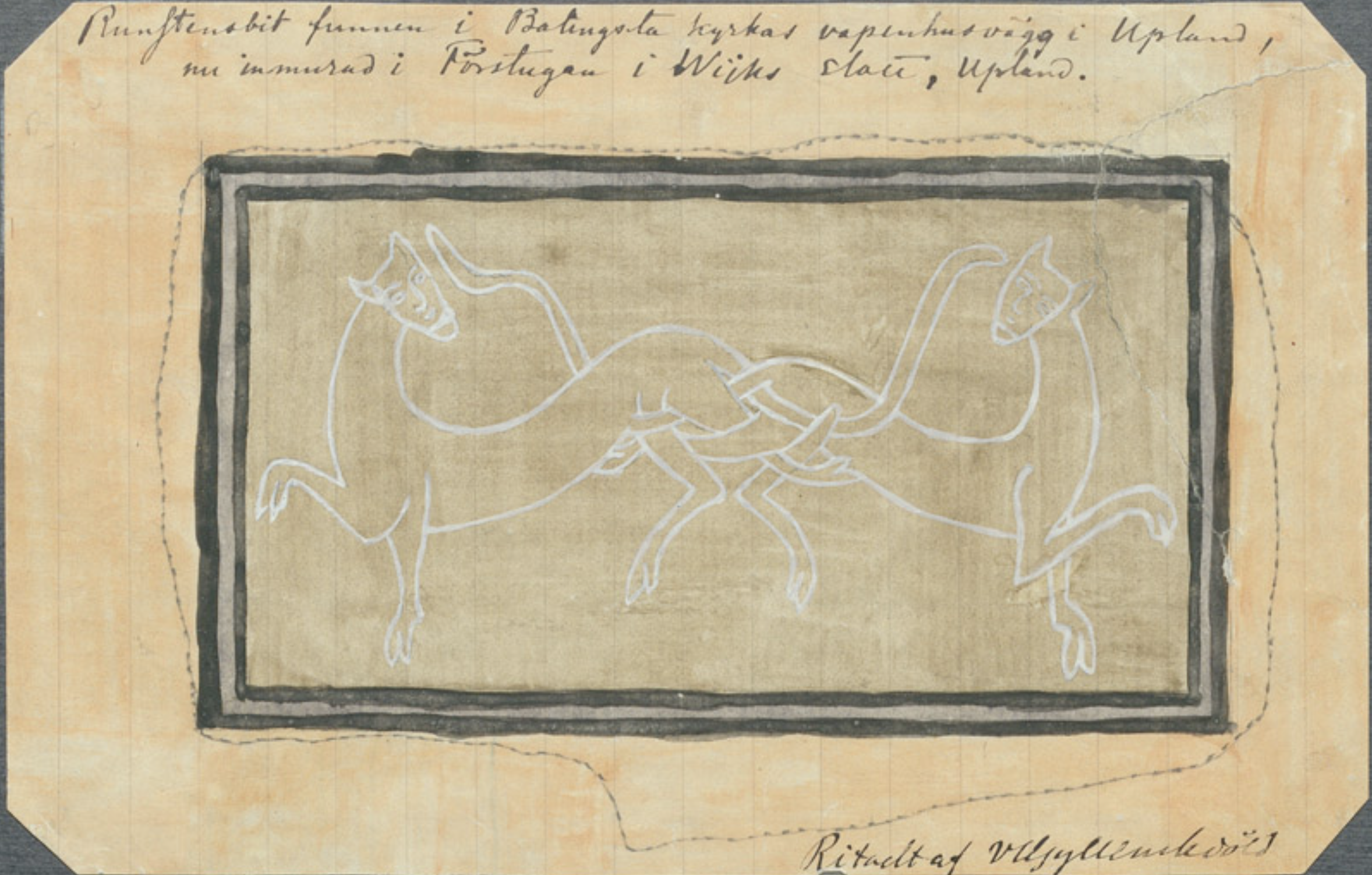 Del av täckhäll eller runsten med två fyrfotadjur, tidigare inmurad i kyrkans vapenhus, uttagen 1867 och nu i Wiks slott. Teckning av V. Gyllenskiöld vid 1800-talets slut.